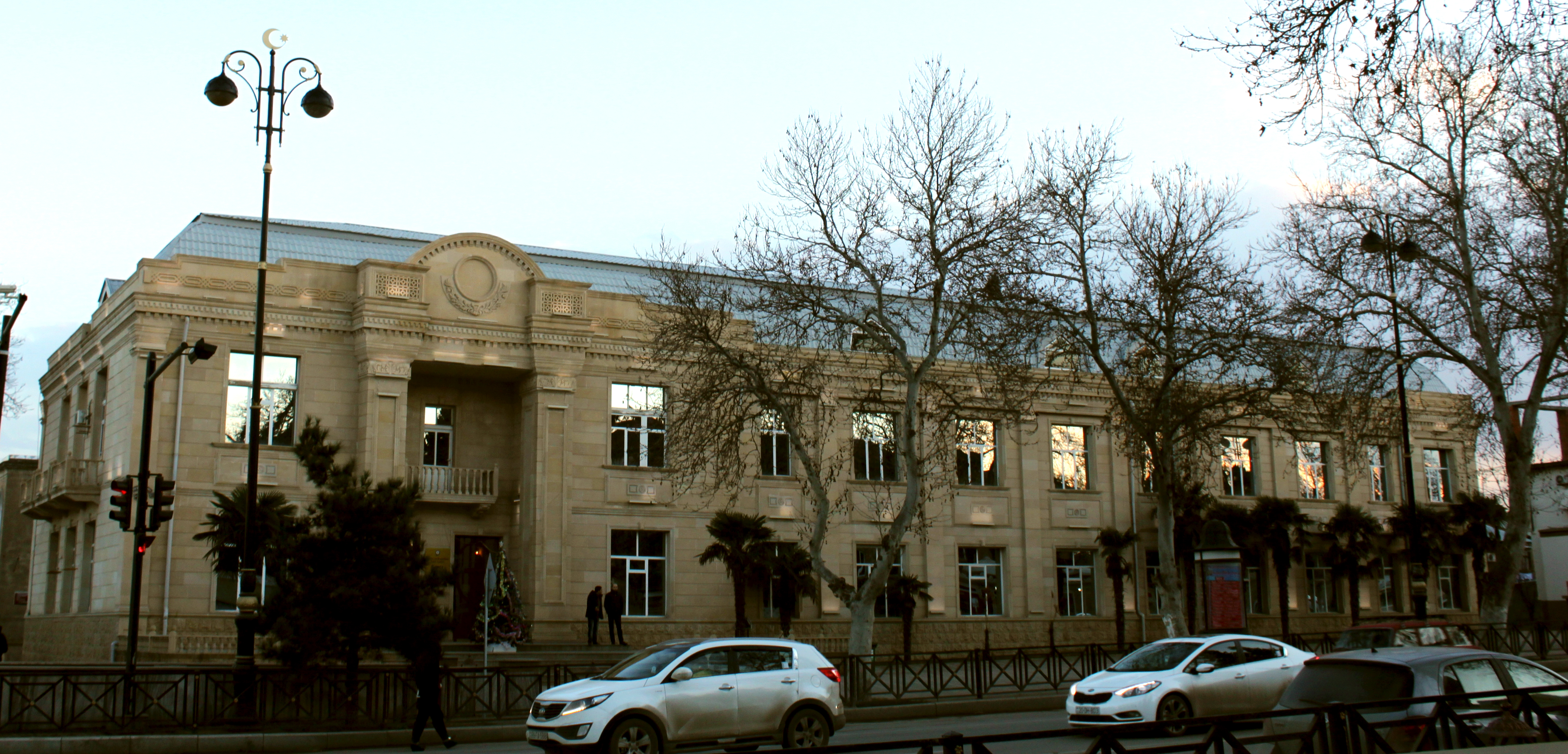 Gəncə Dövlət Universitetinin ikinci korpusu